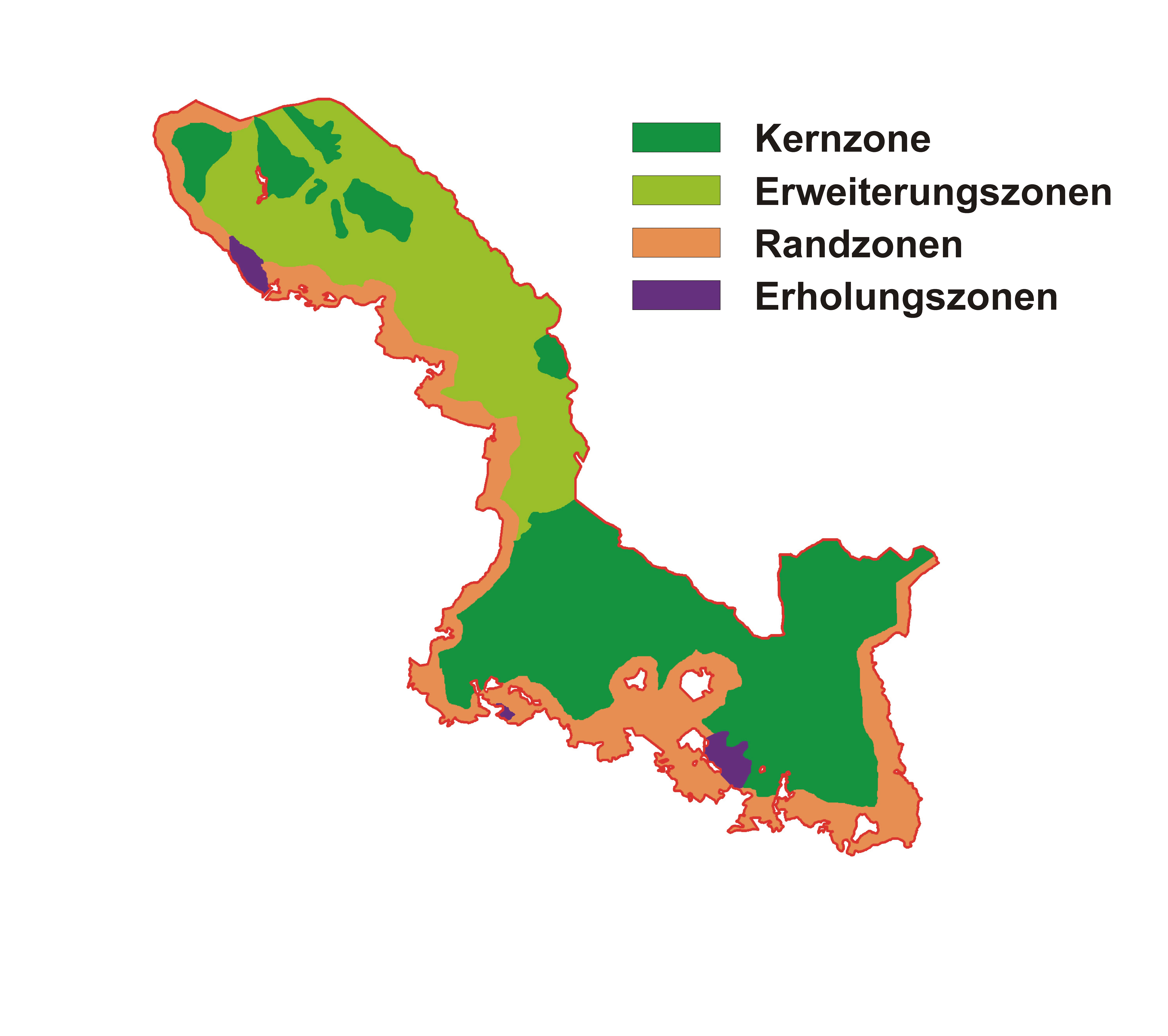 Nationalpark Bayerischer Wald, Management-Zonen